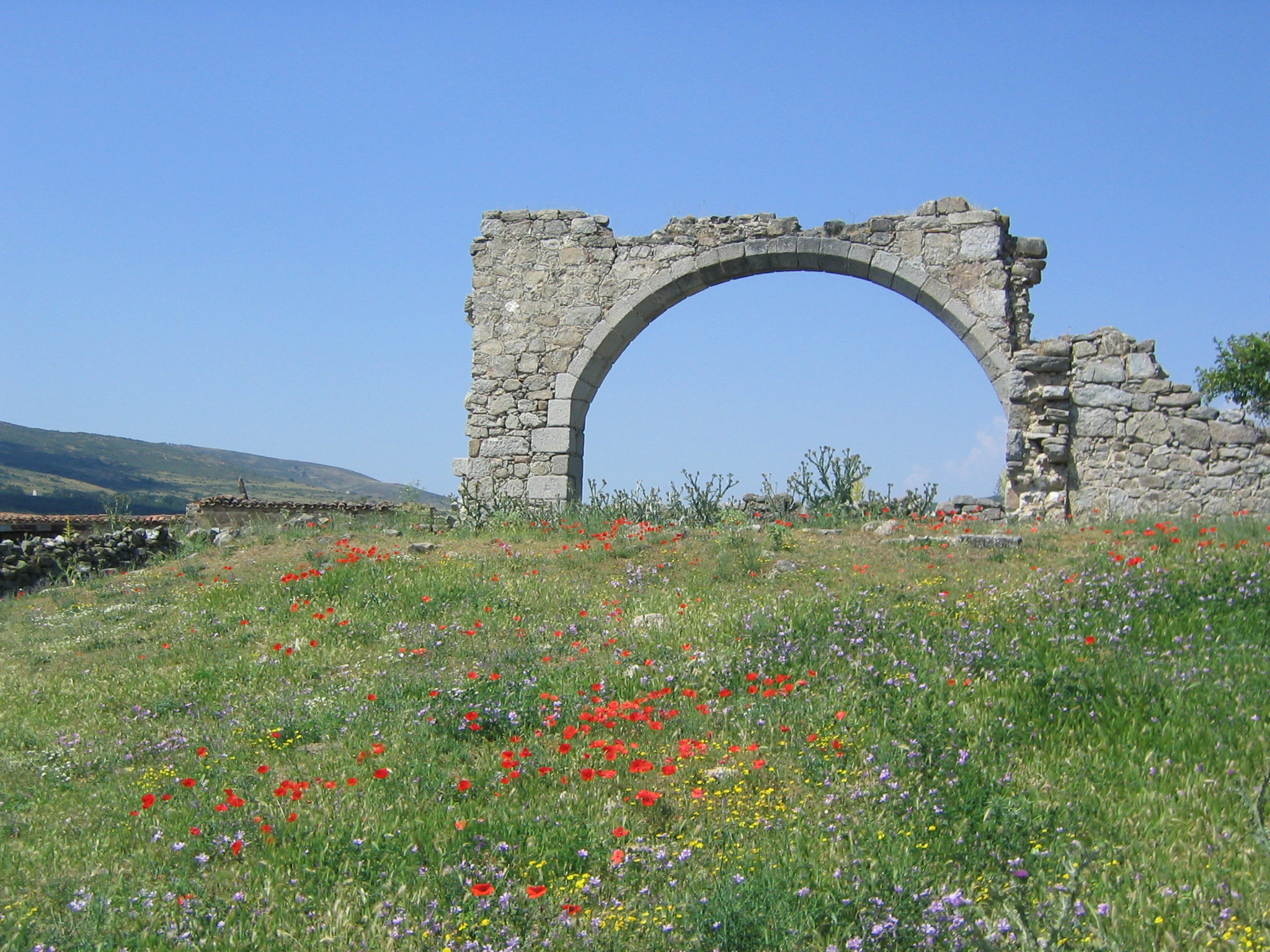 El Espinar, Segovia España. Ruinas de la ermita de Santo Domingo.